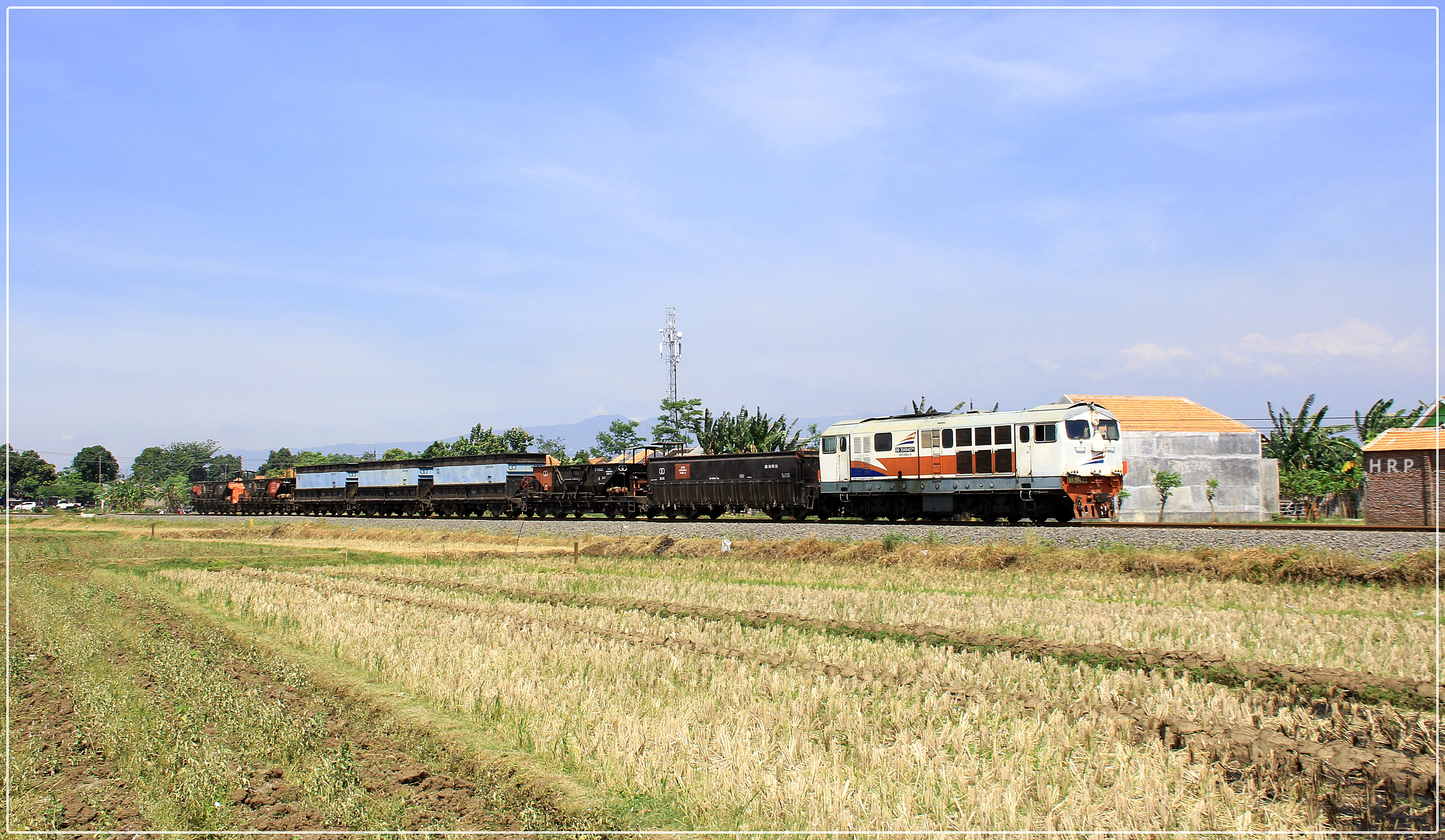 BB 304 23r ketika berdinas klb kricak daop 9